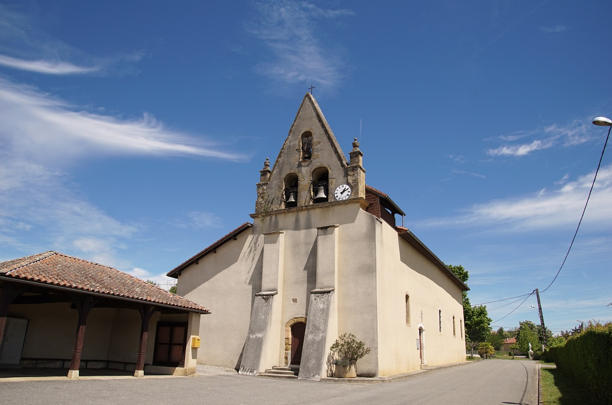 Église Saint-Jean-Baptiste de Lodes, village situé en Haute-Garonne.